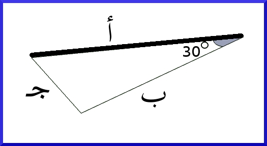 توضيح لمركبات الضلع أ في المكعب عند دورانه -3